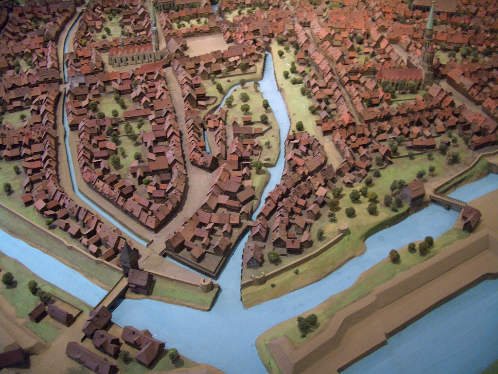 Stadtmodell Braunschweig im Städtischen Museum Braunschweig. Ansicht von "Nord" auf den Zusammenfluss der Braunschweiger Stadtgräben.